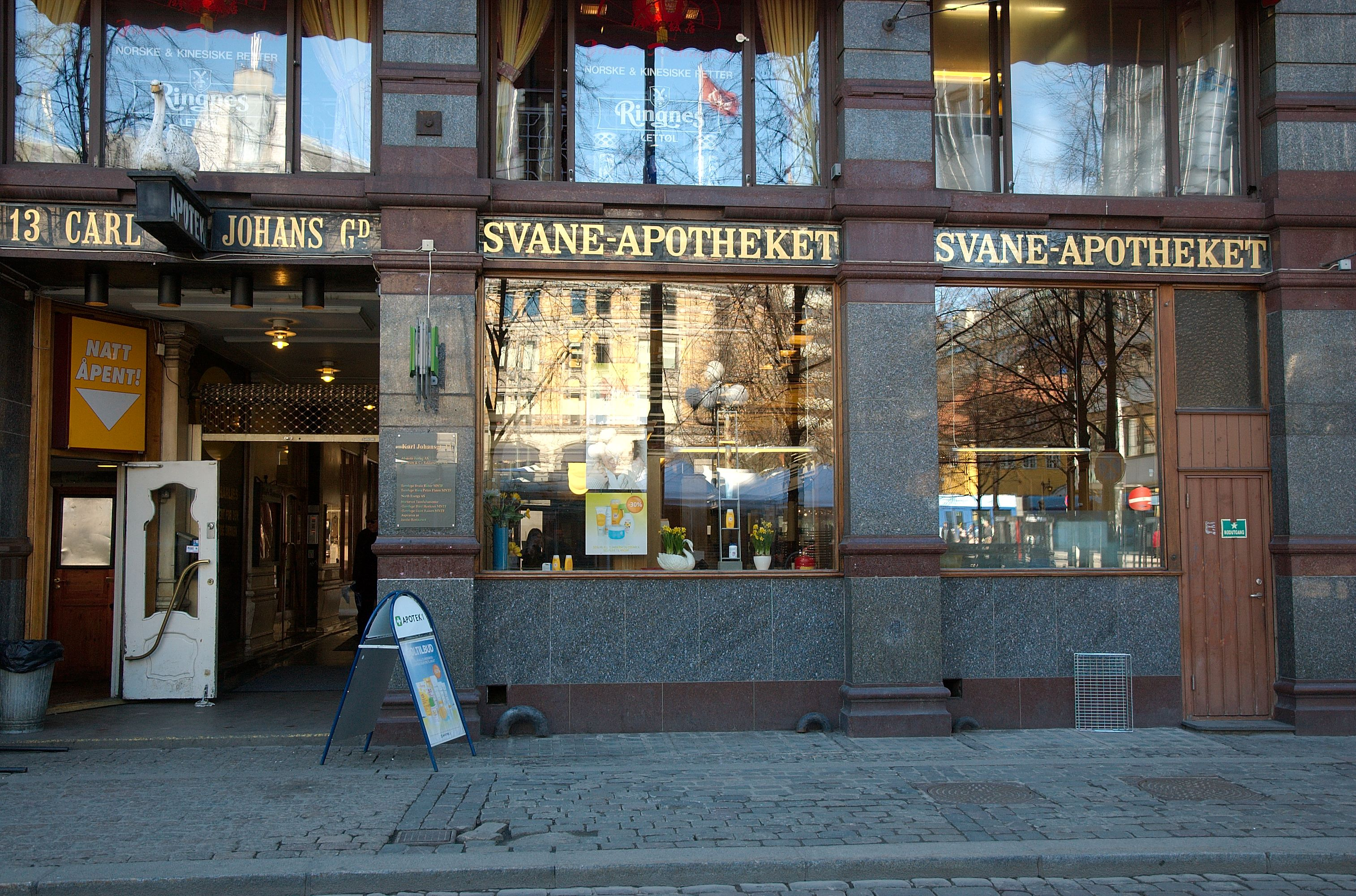 Svaneapoteket i Oslo